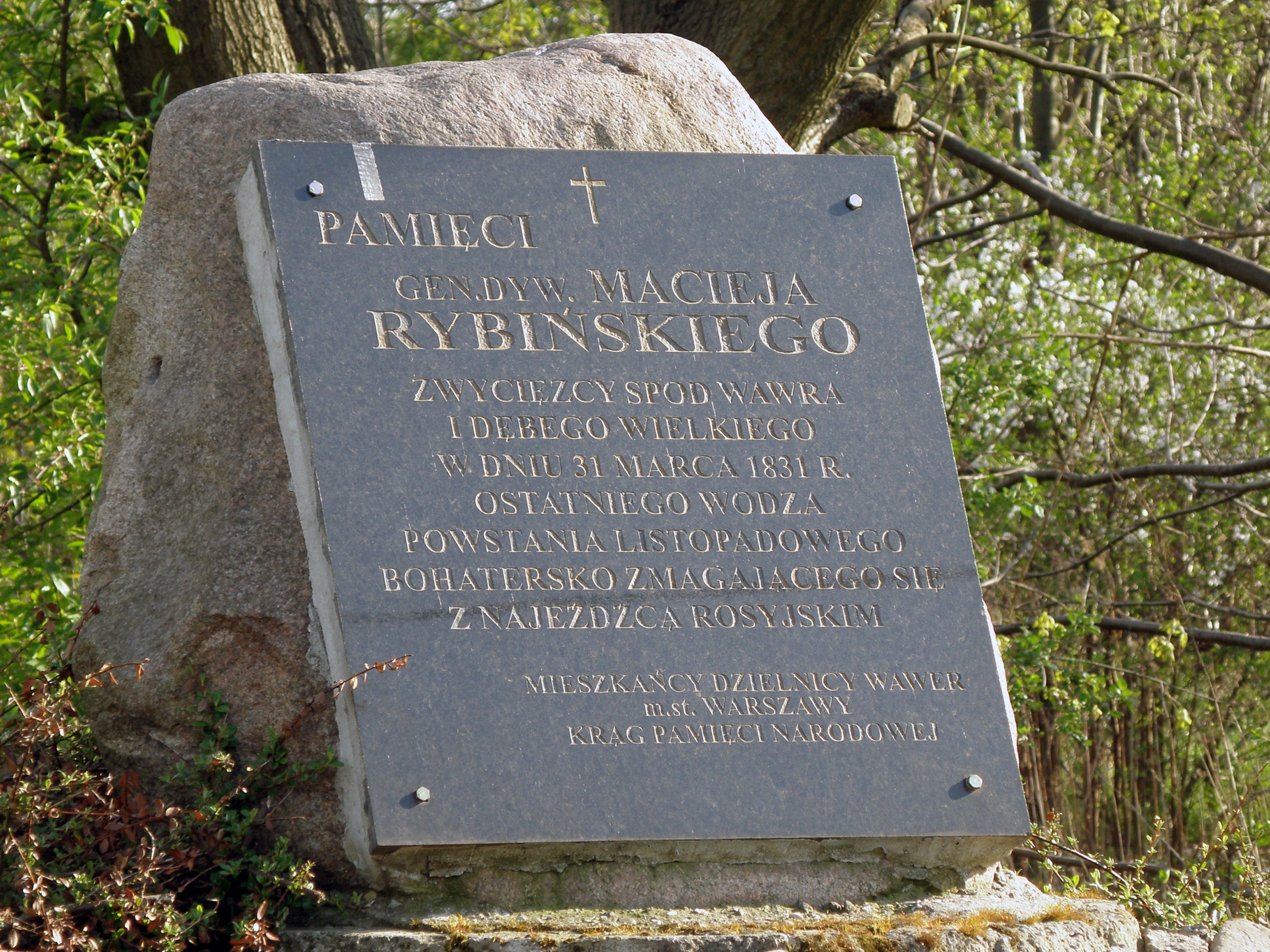 Olszynka Grochowska - Aleja Chwały, ul. Traczy. Głaz pamięci gen. dyw. Macieja Rybińskiego